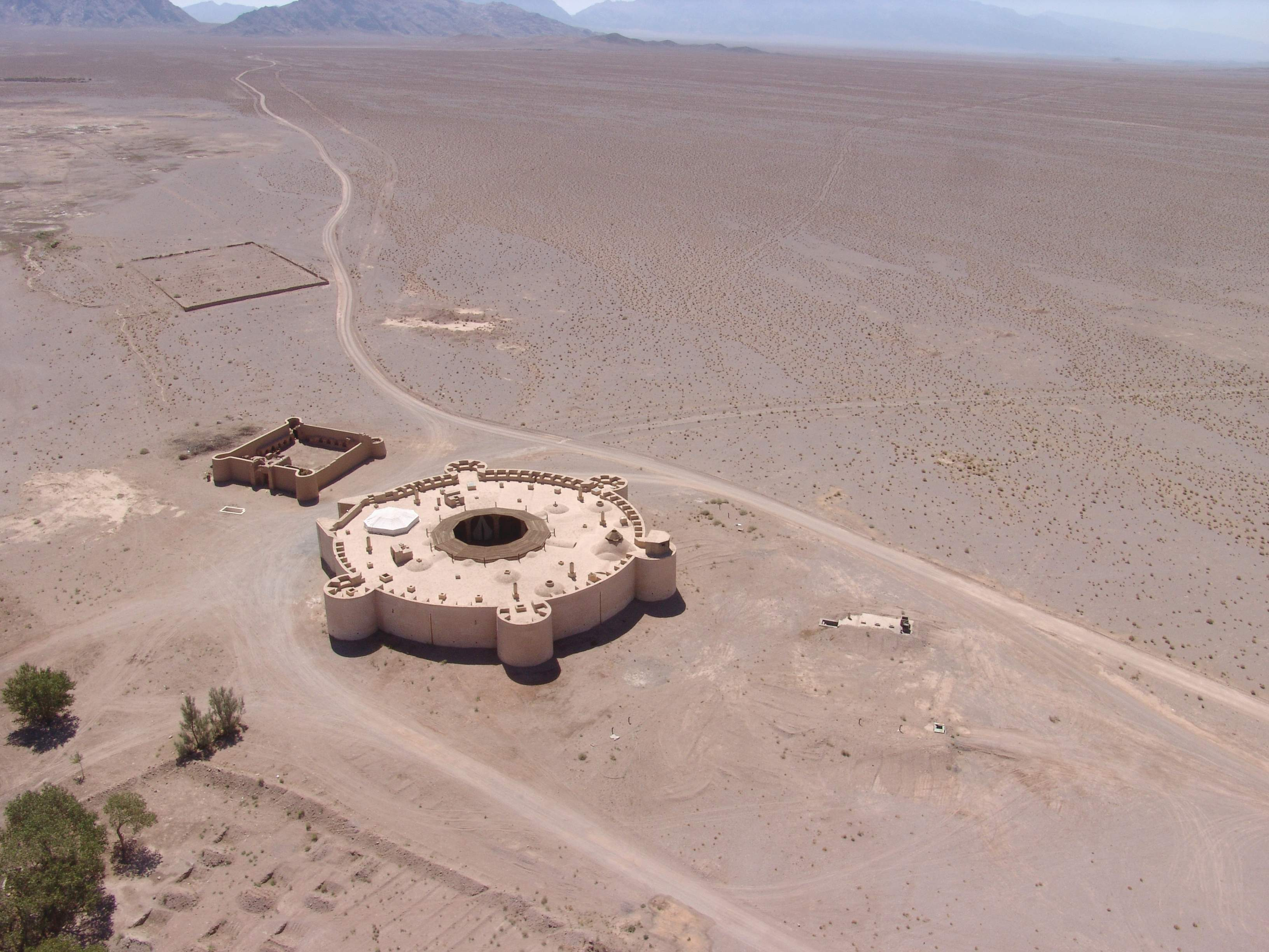 عکس هوایی قلعه زین الدین